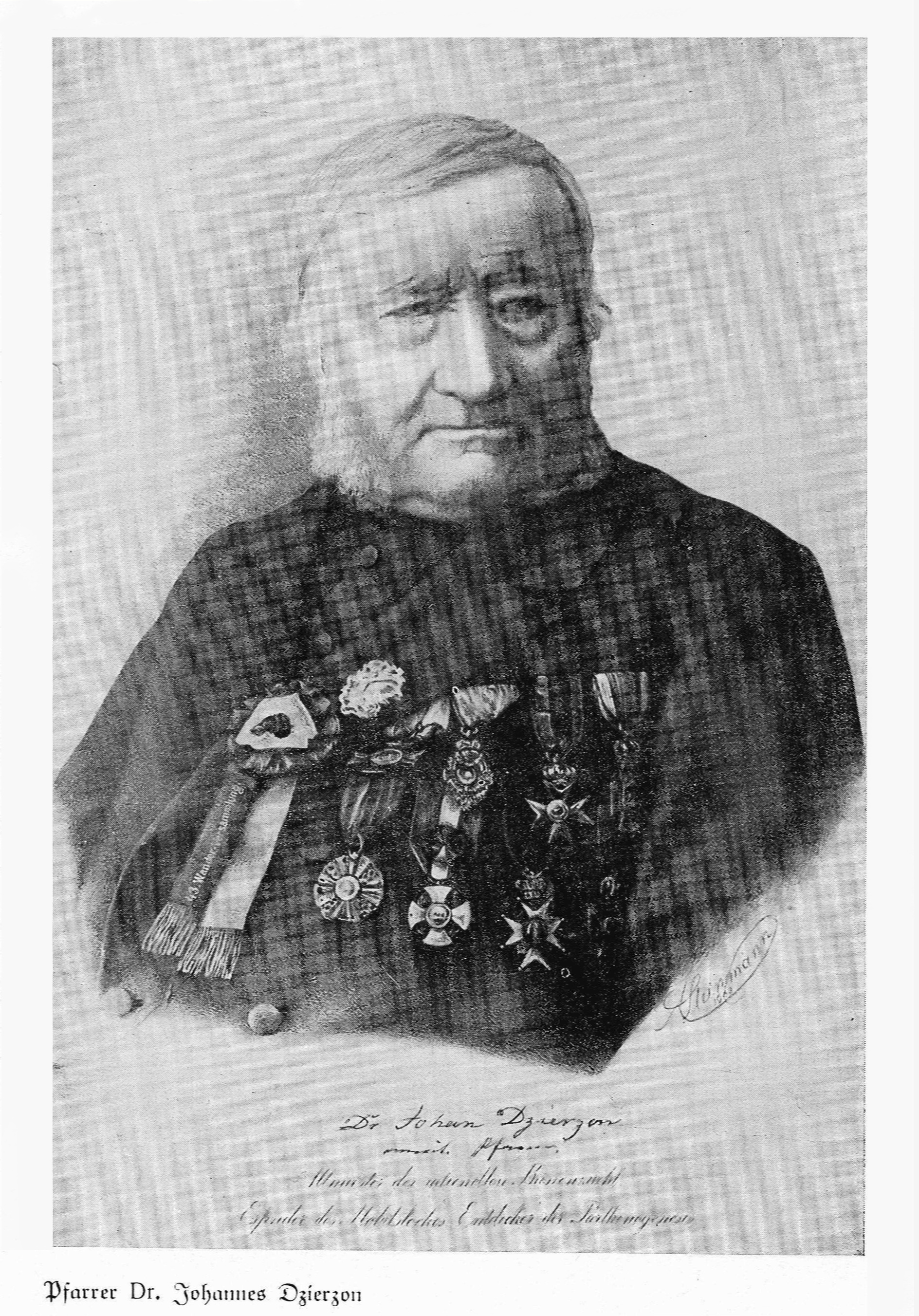 Der Bienenforscher Johann Dzierzon, Foto von A. Steinmann ca. aus dem Jahr 1901. erschienen in: Schriftenreihe der Vereinigung für oberschlesische Heimatkunde, Oppeln 1932, Heft 4 (Frontispiz). Die Aufschrift ganz links lautet "43. Wander-Versammlung" und bezieht sich auf das Treffen deutscher, österreichischer und ungarischer Bienenwirte in Salzburg 1898. Dzierzon veröffentlichte dabei eine "Widerlegung der jüngst gegen meine Theorie der Fortpflanzung der Bienen erhobene Einwände" in der Bienenzeitung 54: 299-302.